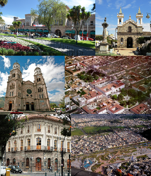 De arriba a abajo y de izquierda a derecha, Parque Pedro Moncayo y el Castillo de Ibarra, Iglesia de San Agustín, Basílica de la Dolorosa, Casco Antiguo de Ibarra, la Casa de la Ibarreñidad y vista del sur de la ciudad desde el Parque Céntrica Bulevar.